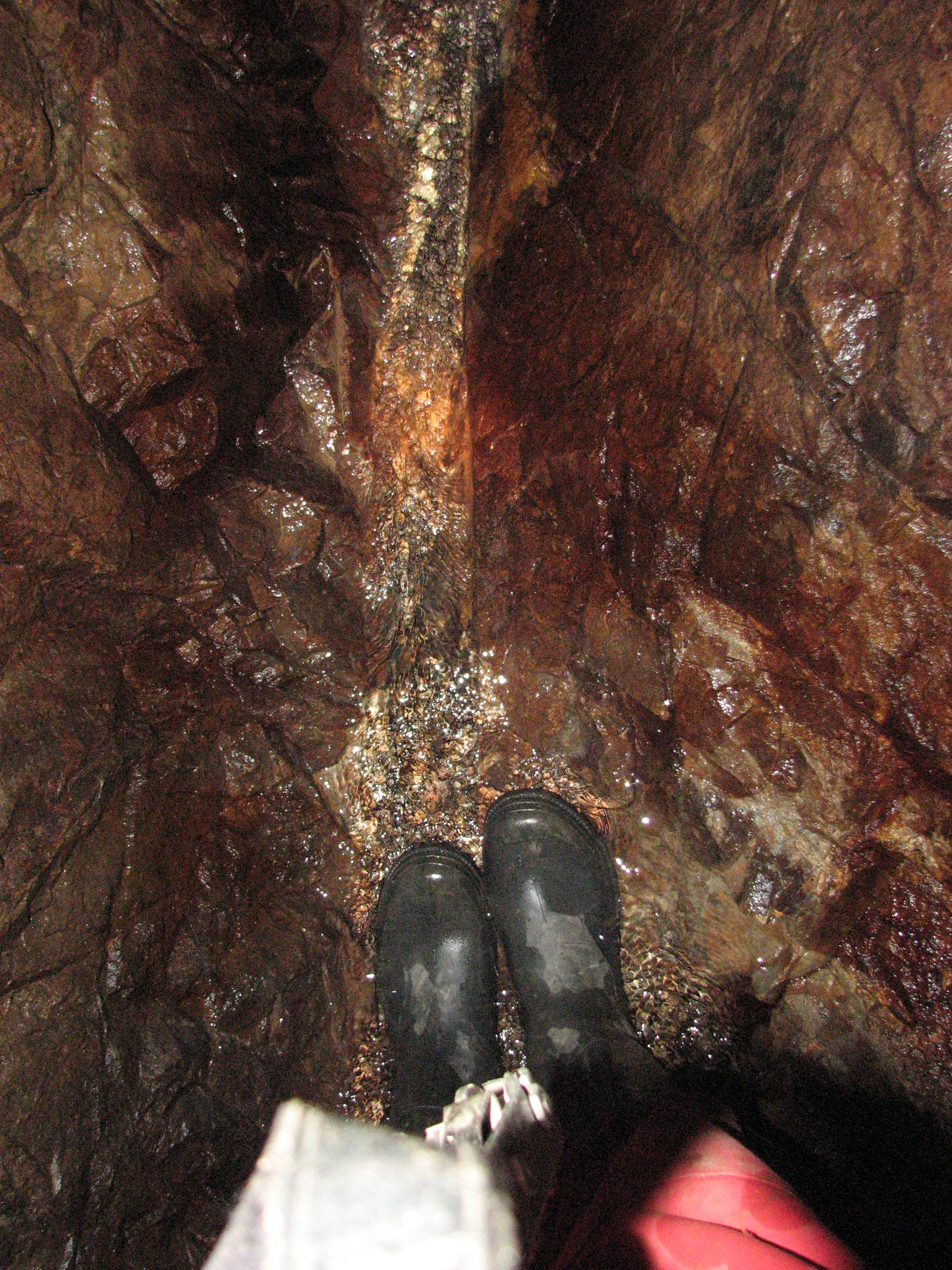 V-förmig vertiefte Stollensohle eines Wasserlösungsstollen (evtl. nachgerissen, kein Erbstollen) zur besseren Ableitung der Wässer. 16.-17. Jahrhundert, Schwarzweald, Deutschland.